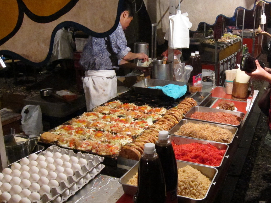 お祭りでの屋台